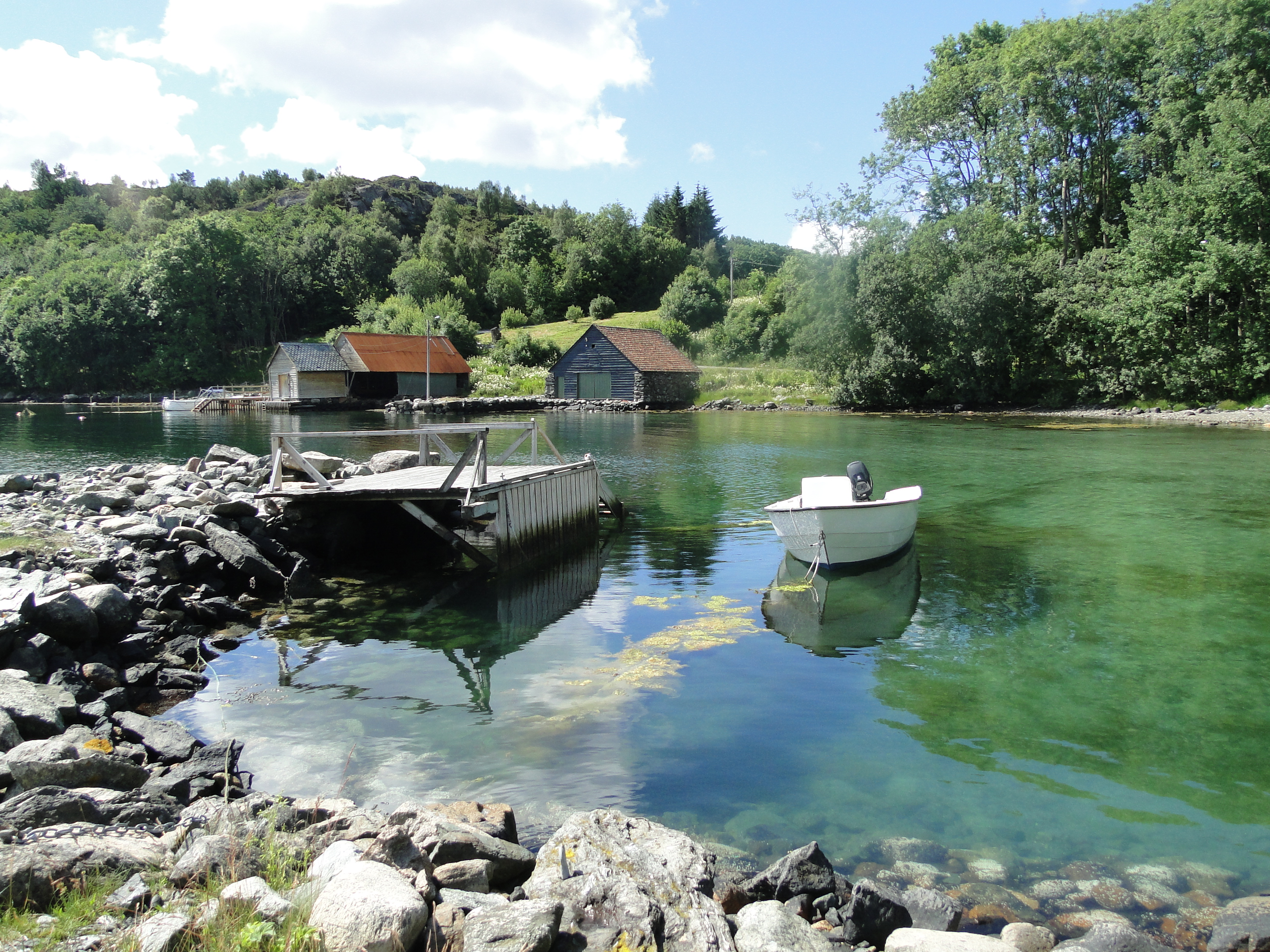 Zdjęcie wykonane na pięknej malowniczej wysepce o nazwie Sotra w Norwegii latem 2012:)